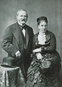 Густав и Шарлотта Фаберже